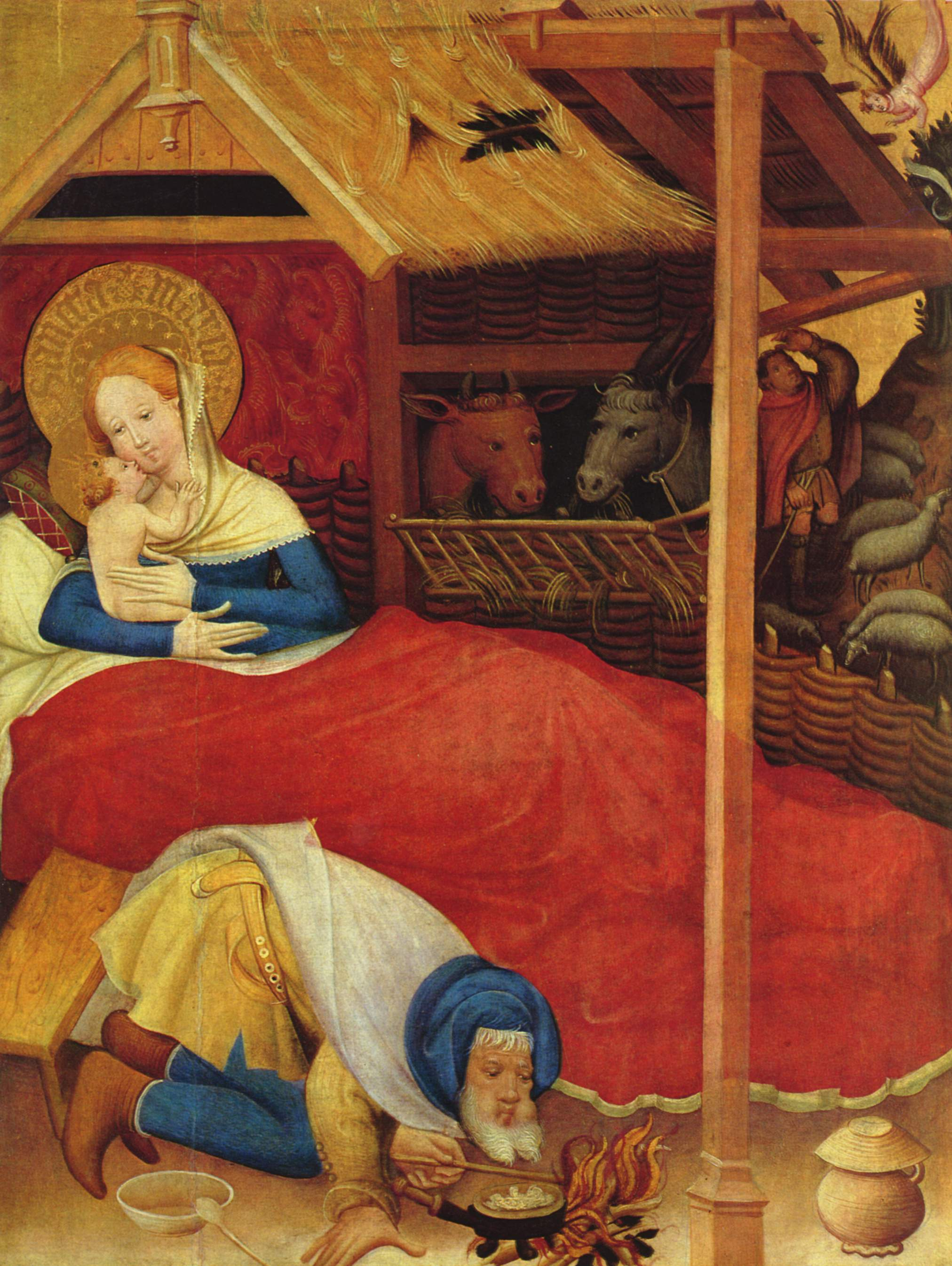 Passionsaltar (Wildungen-Altar), linker Flügel: Maria Verkündigung, Christis Geburt, Anbetung der Drei Heiligen Könige, Präsentation Christi im Tempel, Detail: Christi Geburt